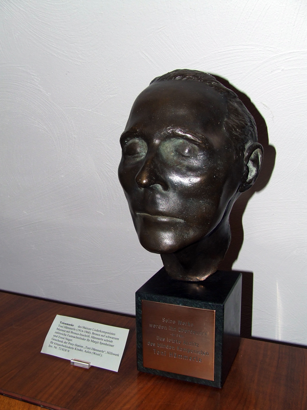 Totenmaske des Mainzer Liederkomponisten Toni Hämmerle (1914-1968). Bronze auf schwarzem Marmor mit Bronze-Inschrift. Hämmerle schrieb zahlreiche Fastnachtslieder für Margit Sponheimer und Ernst Neger. Geschenk der Pony-Station Toni Hämmerle, Hilfswerk für körperbehinderte Kinder, Aalen Westfalen an das Mainzer Fastnachtsmuseum